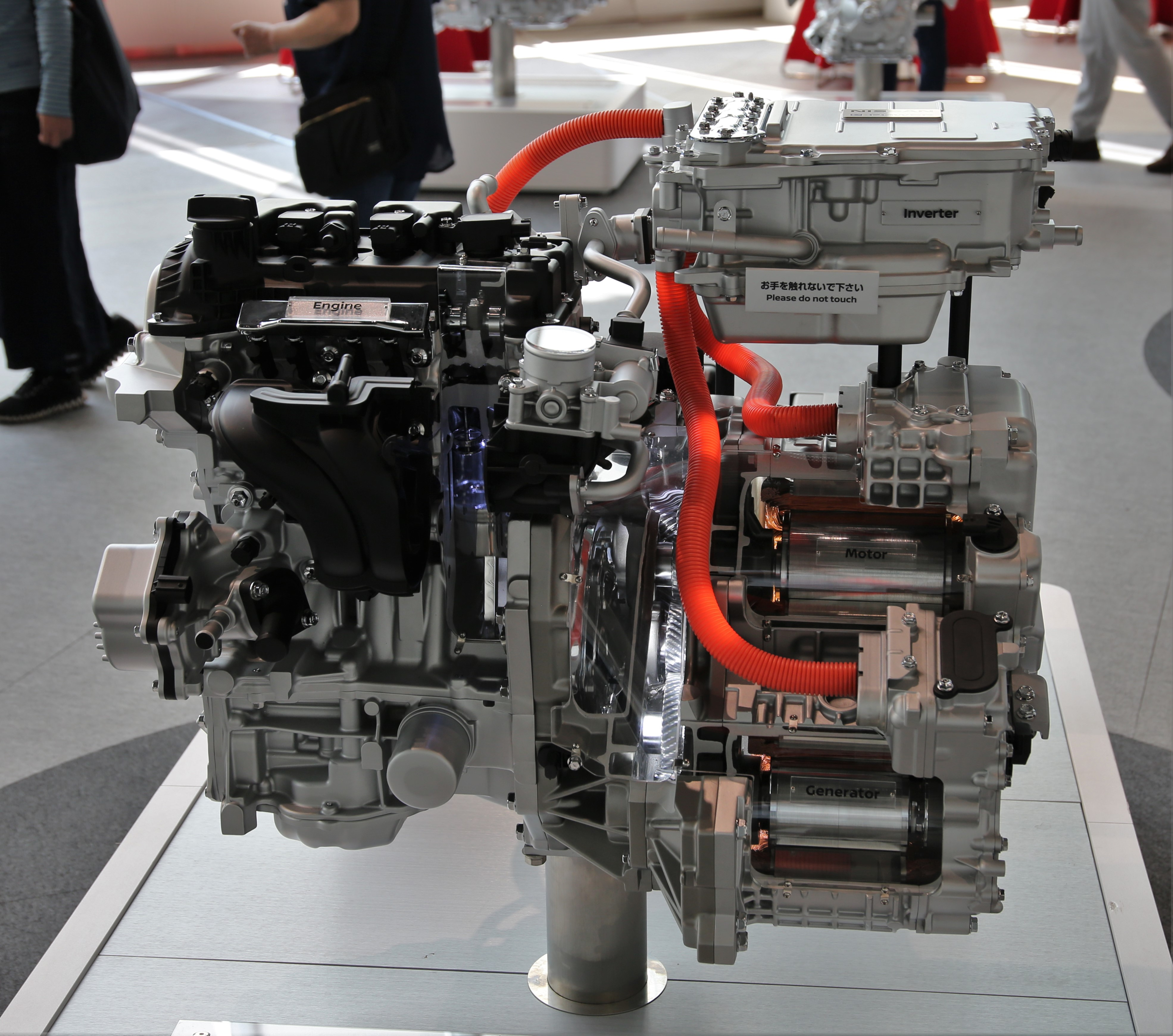 Nissan Note e-POWER